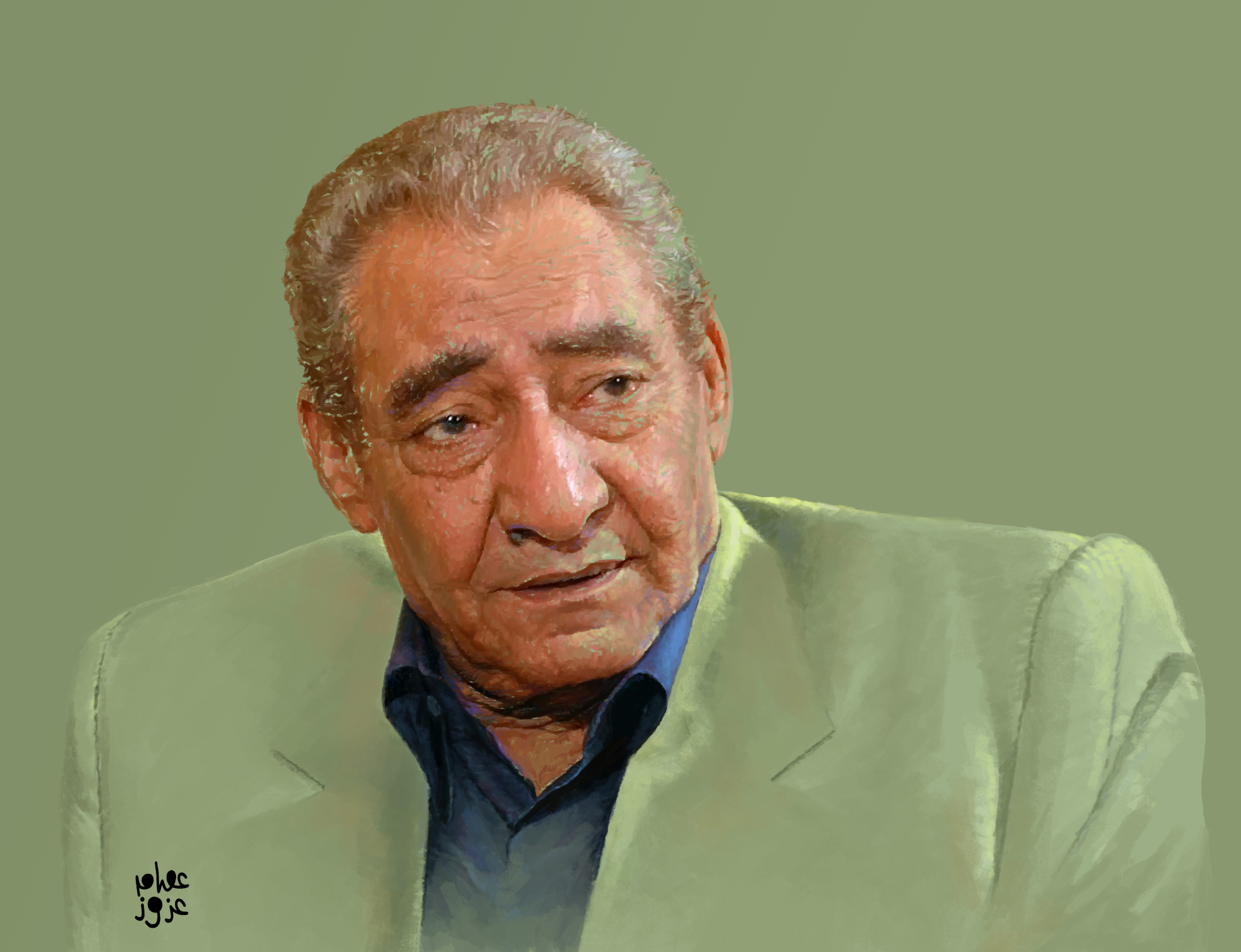 عصـام عـــزوز